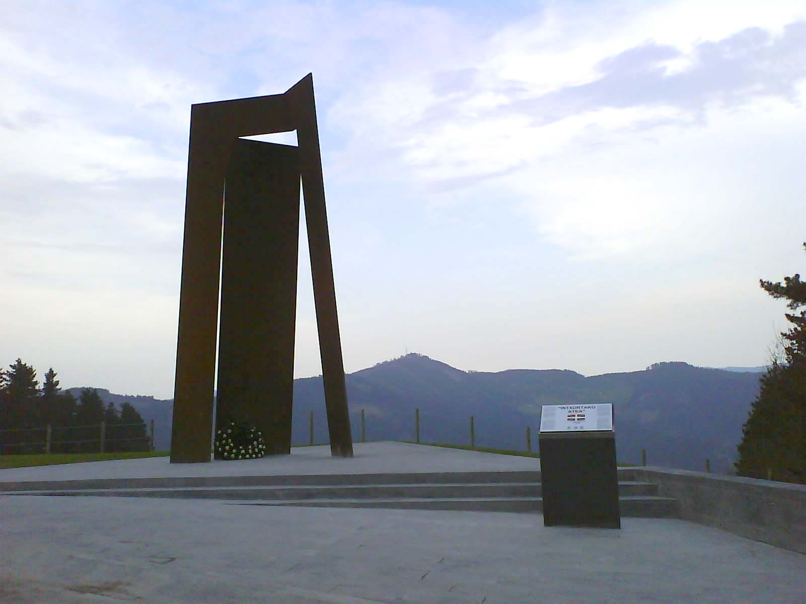 Monumento a los guadris (soldados) caidos en defensa de la República en la batalla de los Intxortas, Elgueta Guipúzcoa (País vasco) (España).